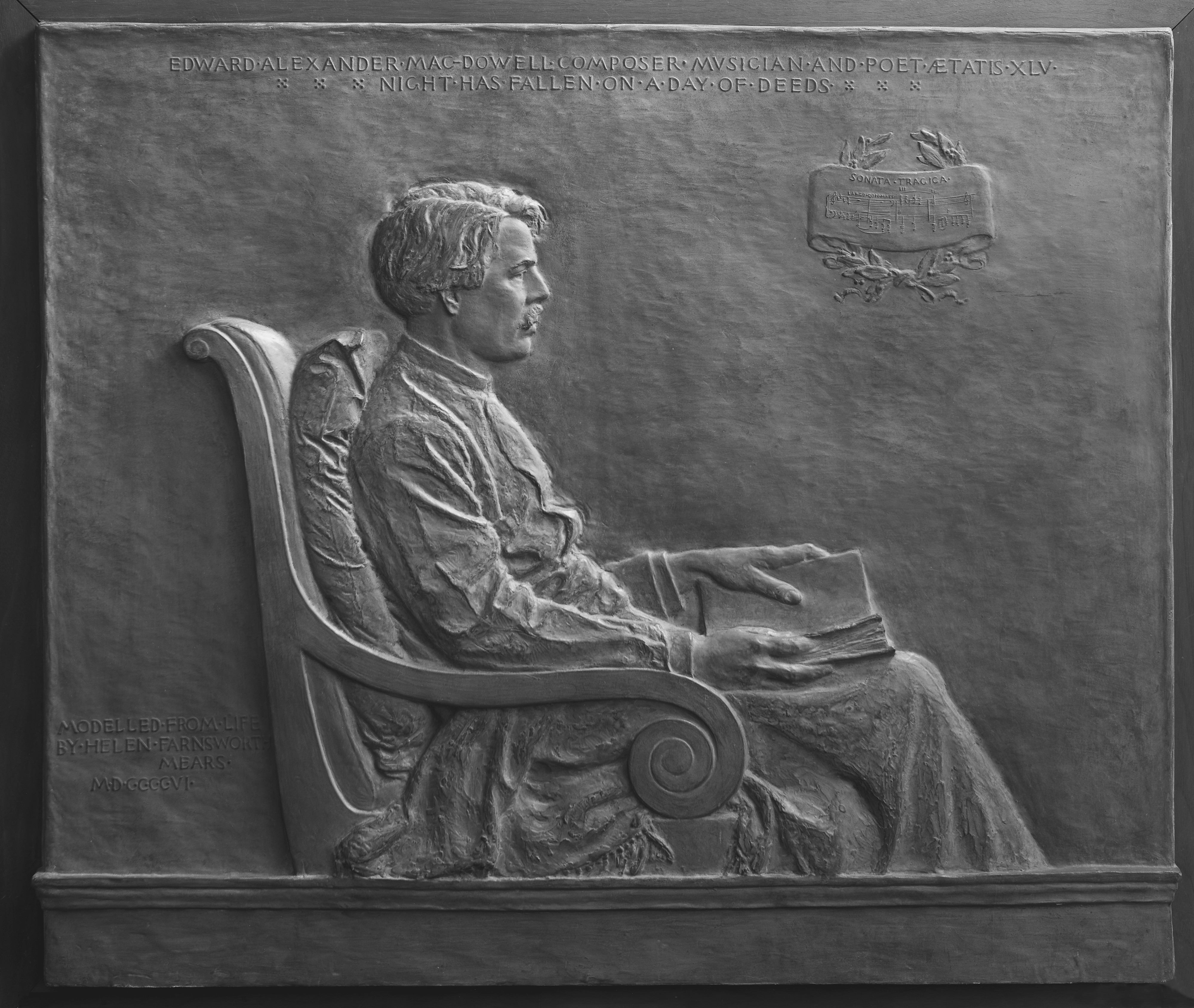 Sculpture; Sculpture